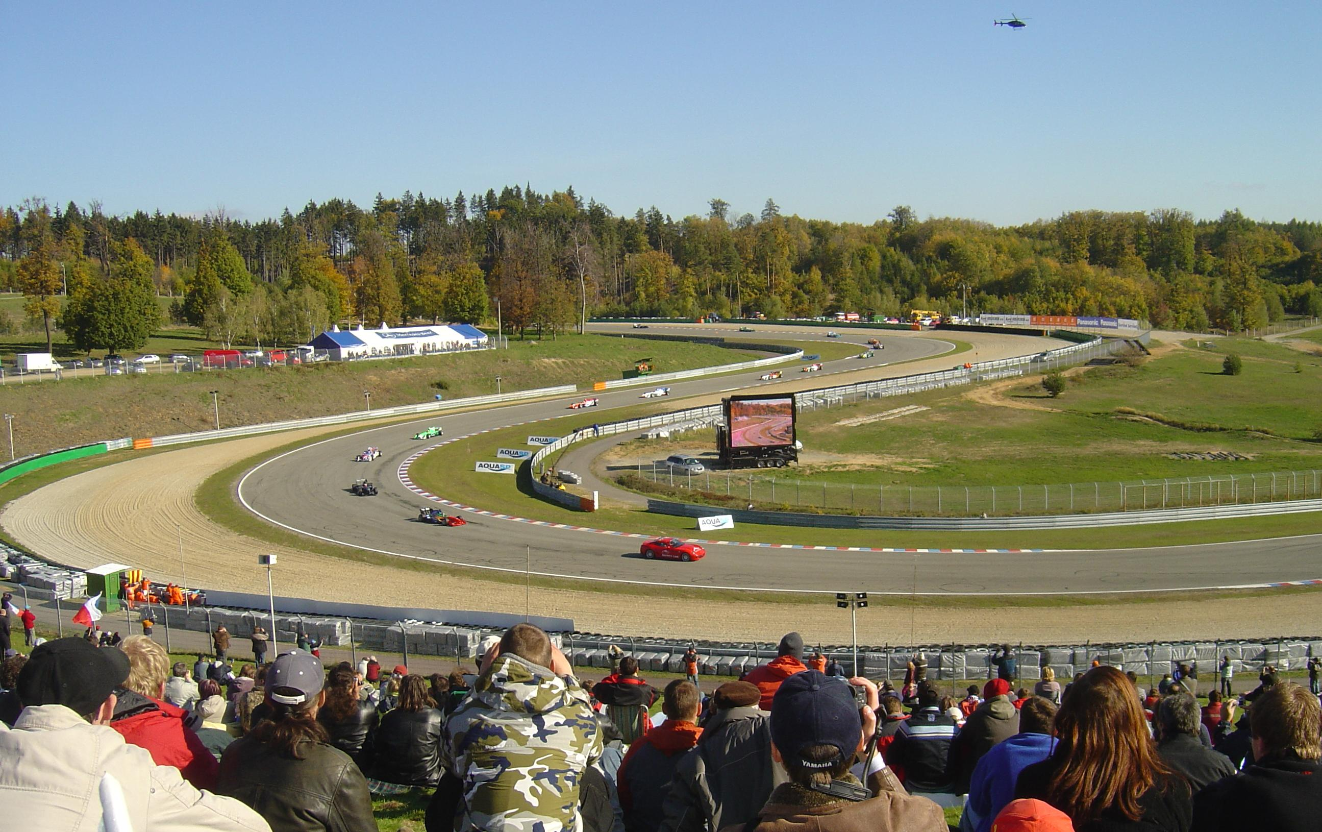 Omega-Kurve, entstanden im Rahmen des A1GP-Rennwochenendes auf dem Automotodrom Brno